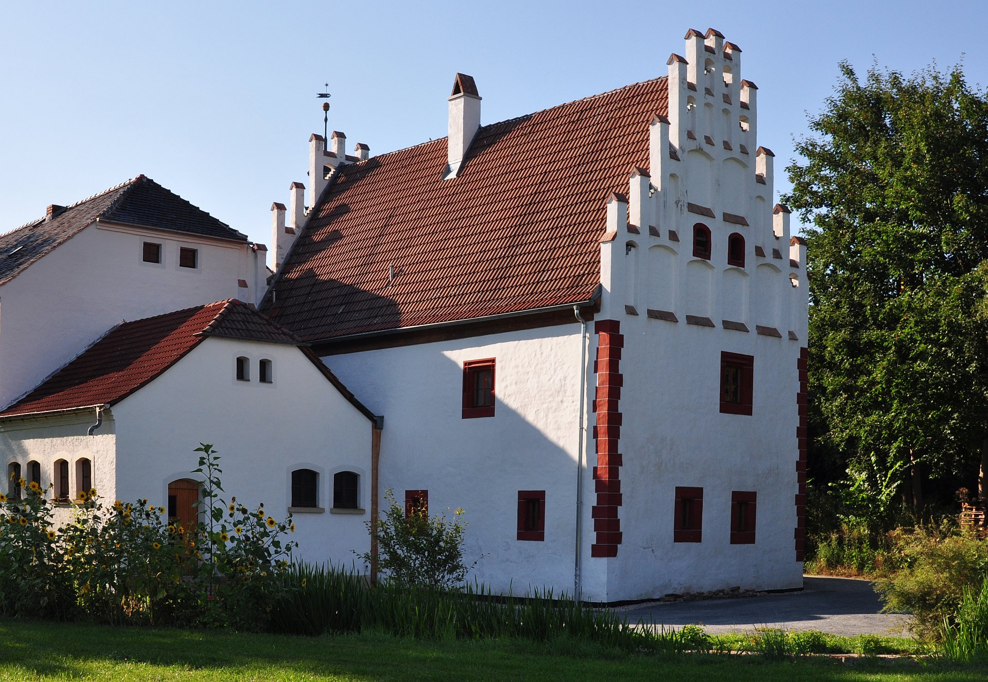 Restaurierte Teile des ehemaligen Zisterziensernonnenklosters Frankenhausen